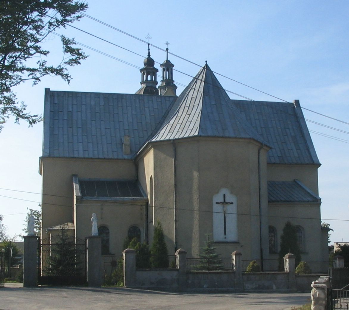 Kościół pw. Nawiedzenia N.M.P. i św. Stanisława Biskupa w Chruszczobrodzie.